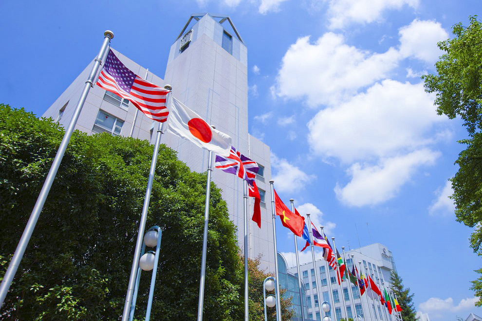 東京国際大学 第1キャンパス